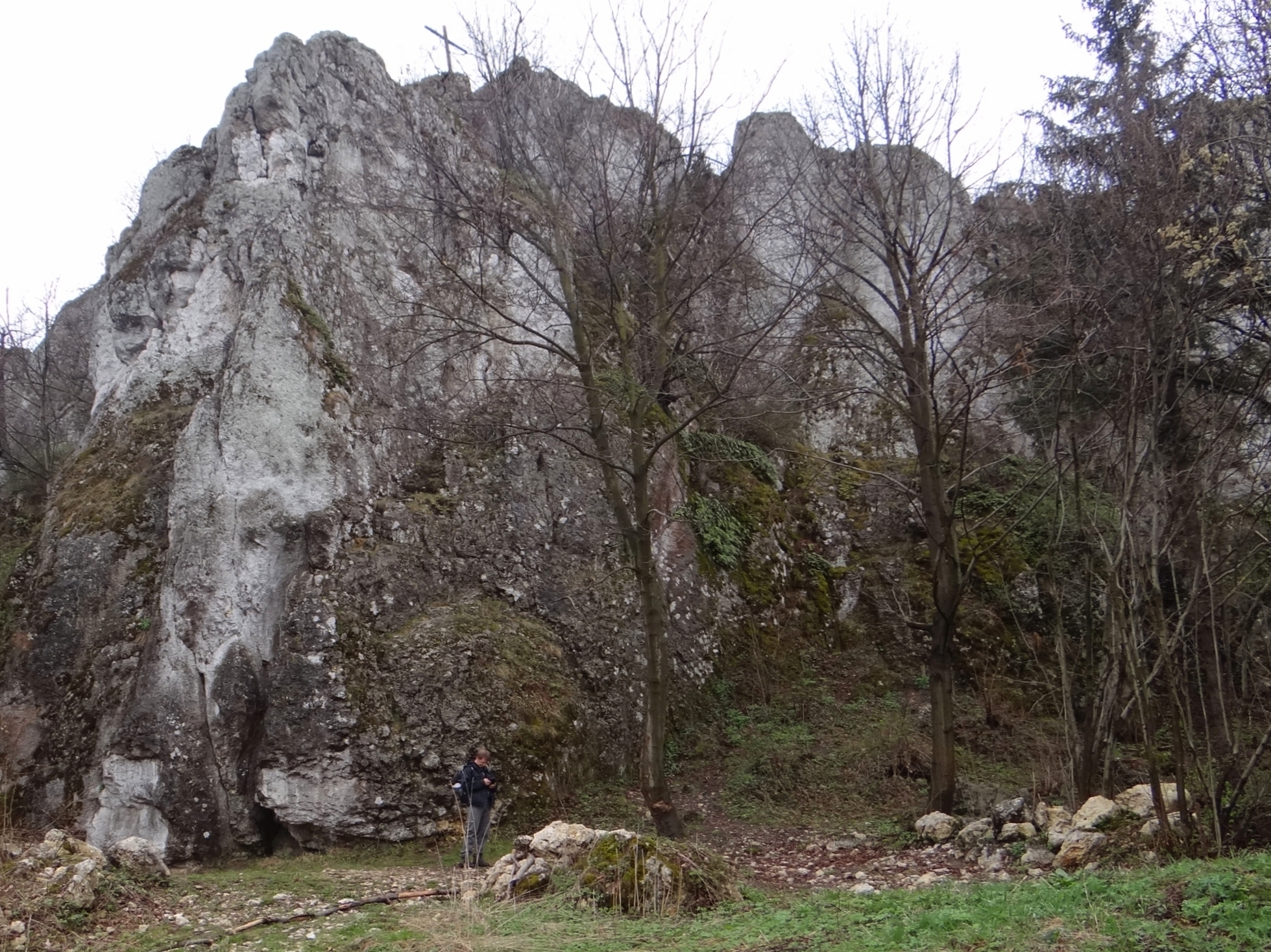 Chochołowe Skały w Dolinie Szklarki. Krzyżowa